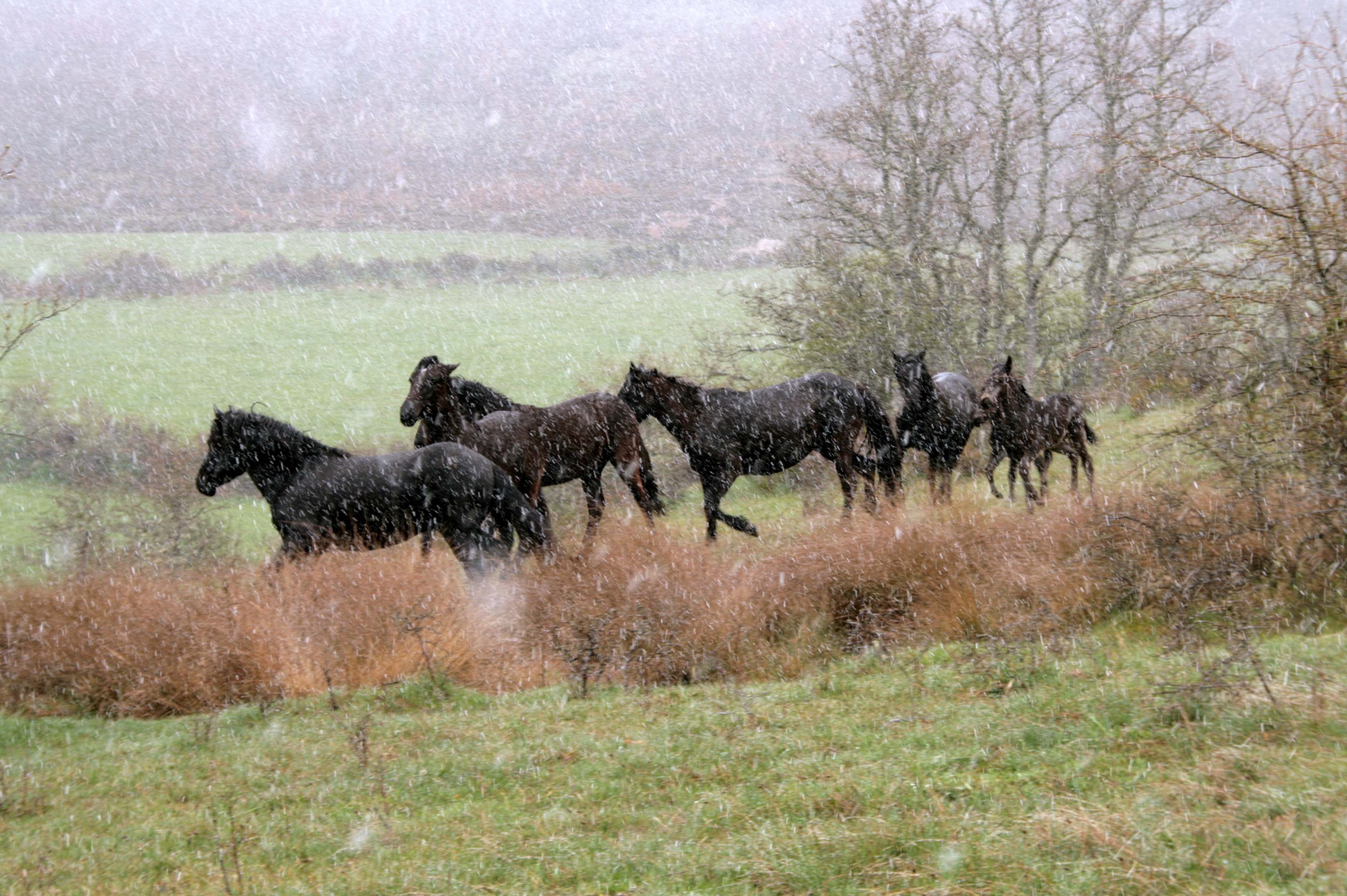 Caballos losinos en Bison Bosanus, Reserva y Centro de Interpretación del Bisonte Europeo de San Cebrián de Mudá (Palencia) This is a photography of a Special Area of Conservation in Spain with the ID: ES4140011. Natura2000 entry, EEA entry